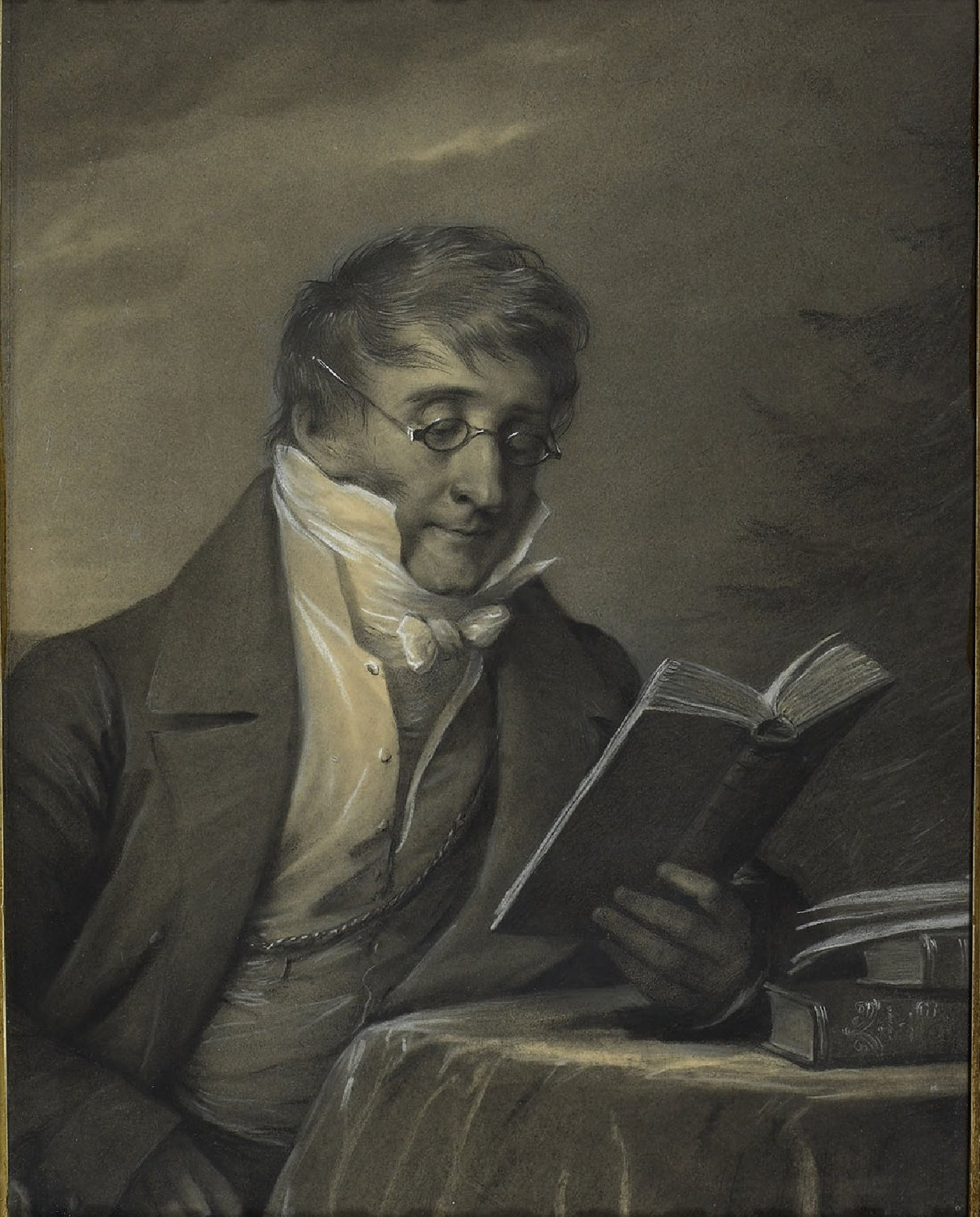 Grisaille propriété de la Bibliothèque de Genève